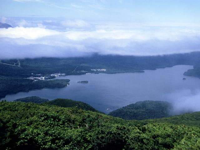 雄阿寒岳から俯瞰した阿寒湖。